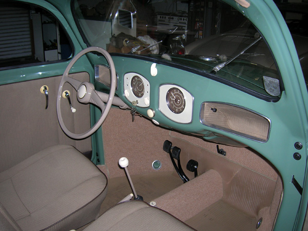 1949 VW dash